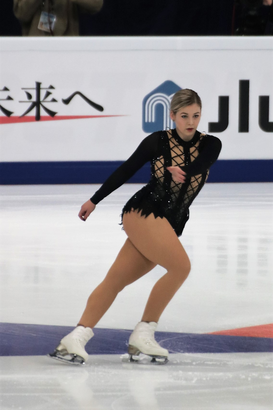 Грейси Голд (США) на Rostelecom Cup 2018